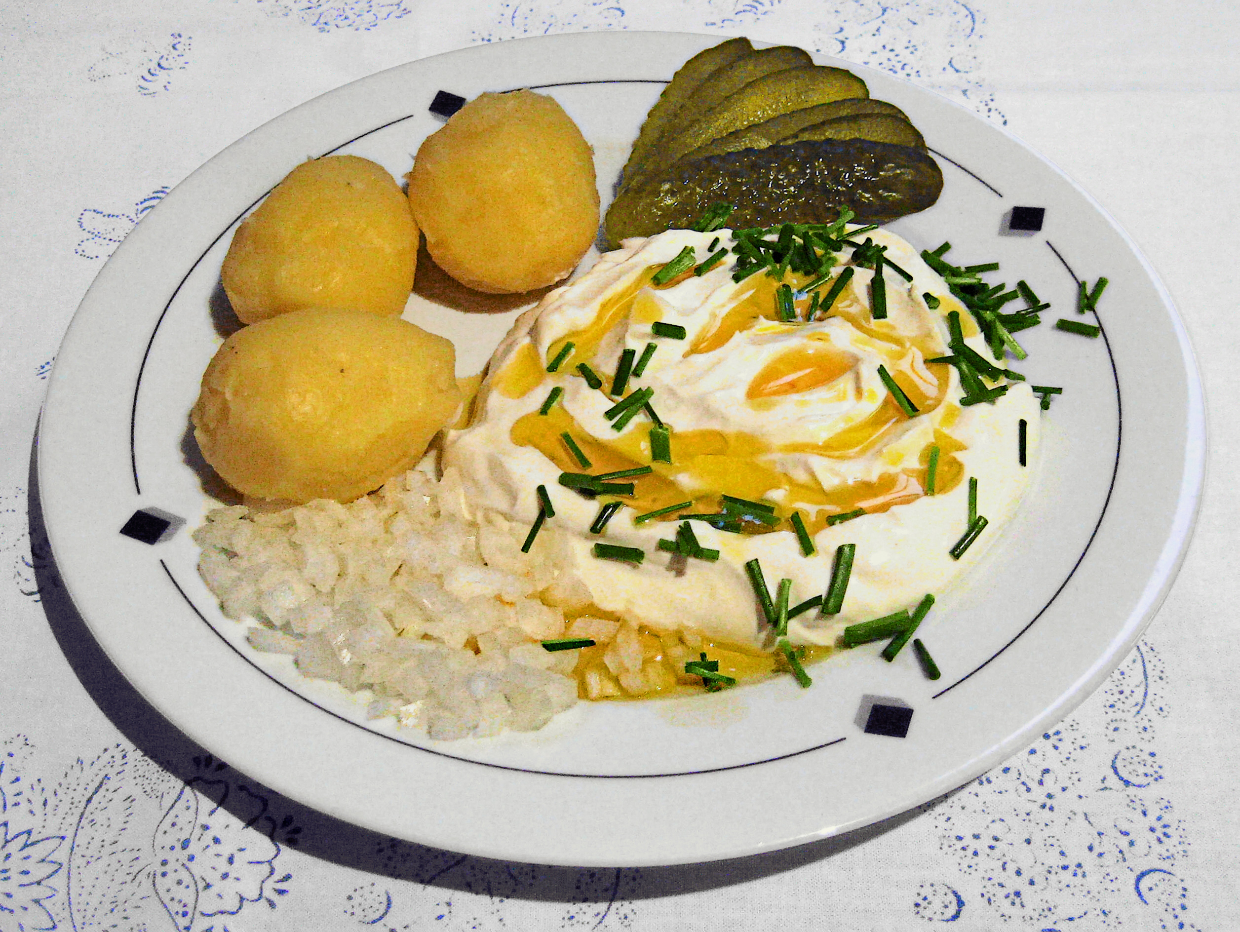 Quark mit Leinöl und Pellkartoffeln, sowie mit gehackten Zwiebeln, Schnittlauch und Gewürzgurke